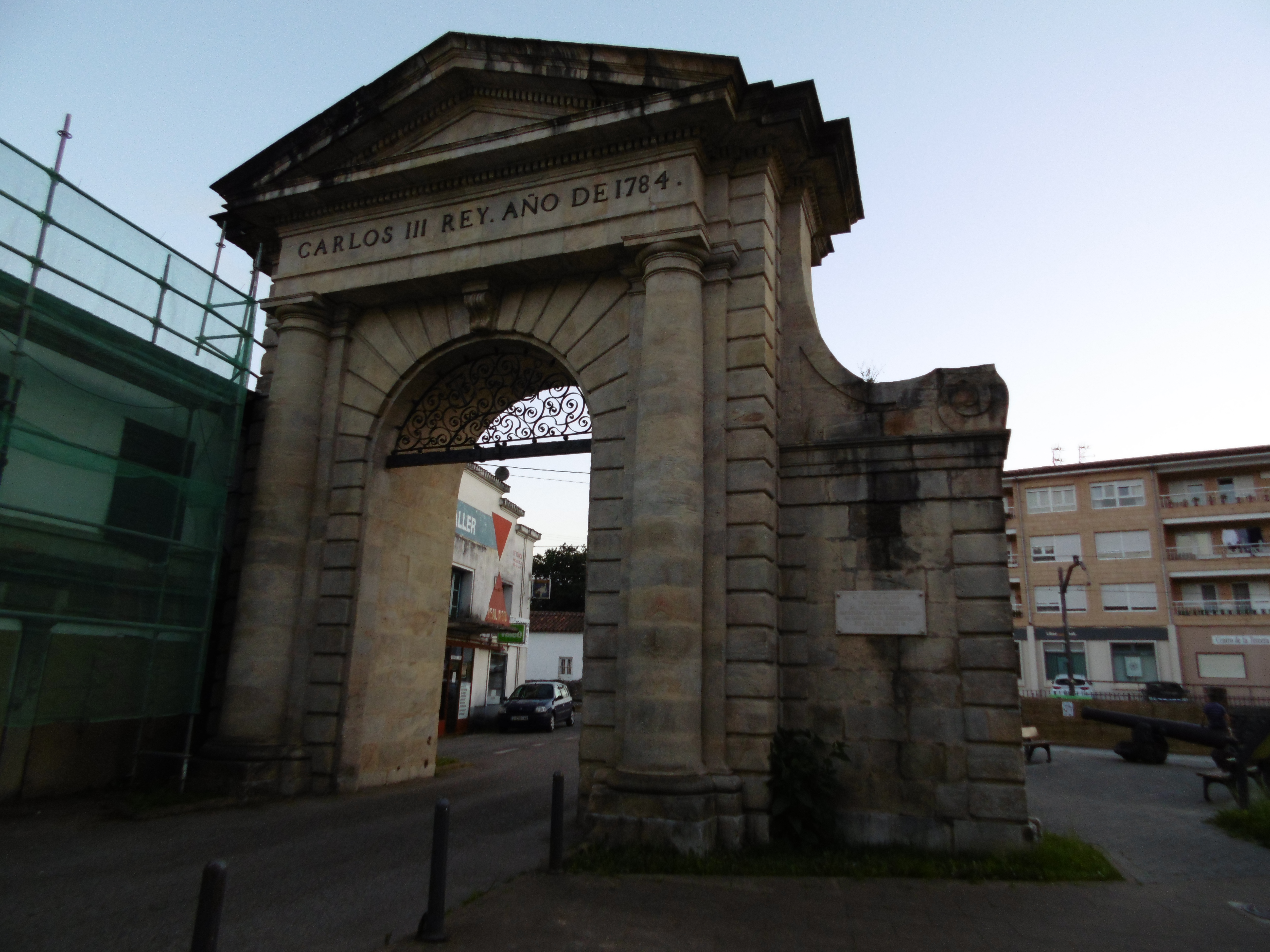 Puerta de Carlos III, antiguo acceso a la Real Fábrica de Artillería.